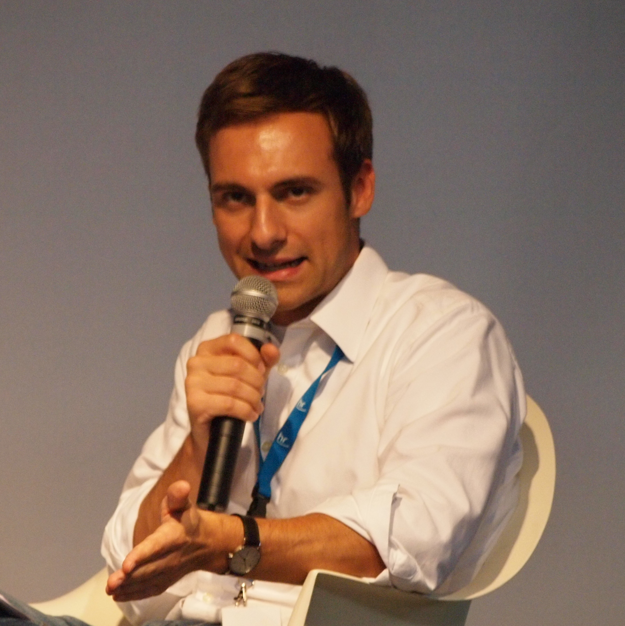 Marc Langebeck auf der Frankfurter Buchmesse 2014